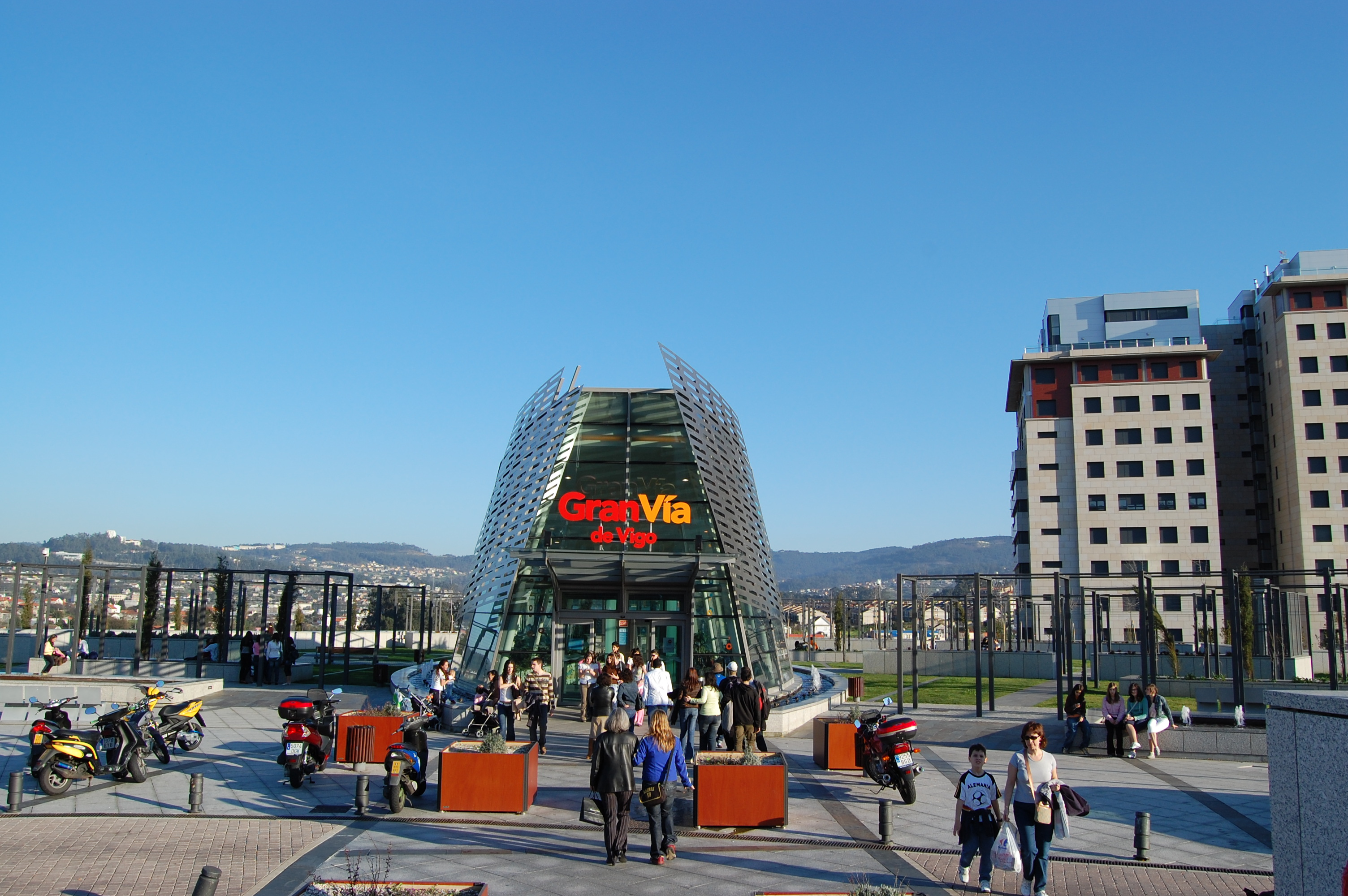 Uma das estradas do Centro Comercial Gran Vía de Vigo.